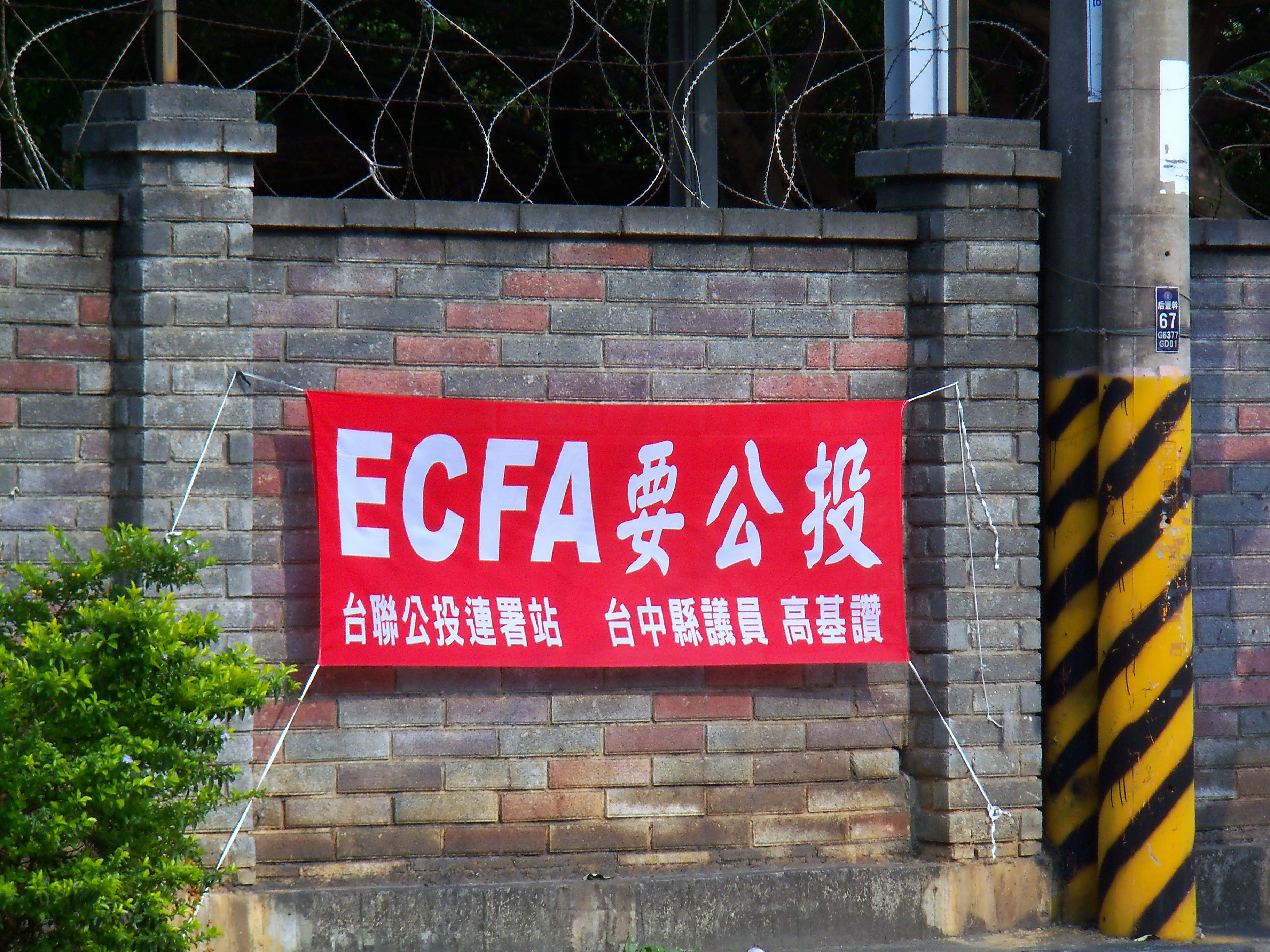 ECFA談判期間，台灣團結聯盟臺中縣議員高基讚訴求舉辦公投的橫幅（臺中縣后里鄉）。